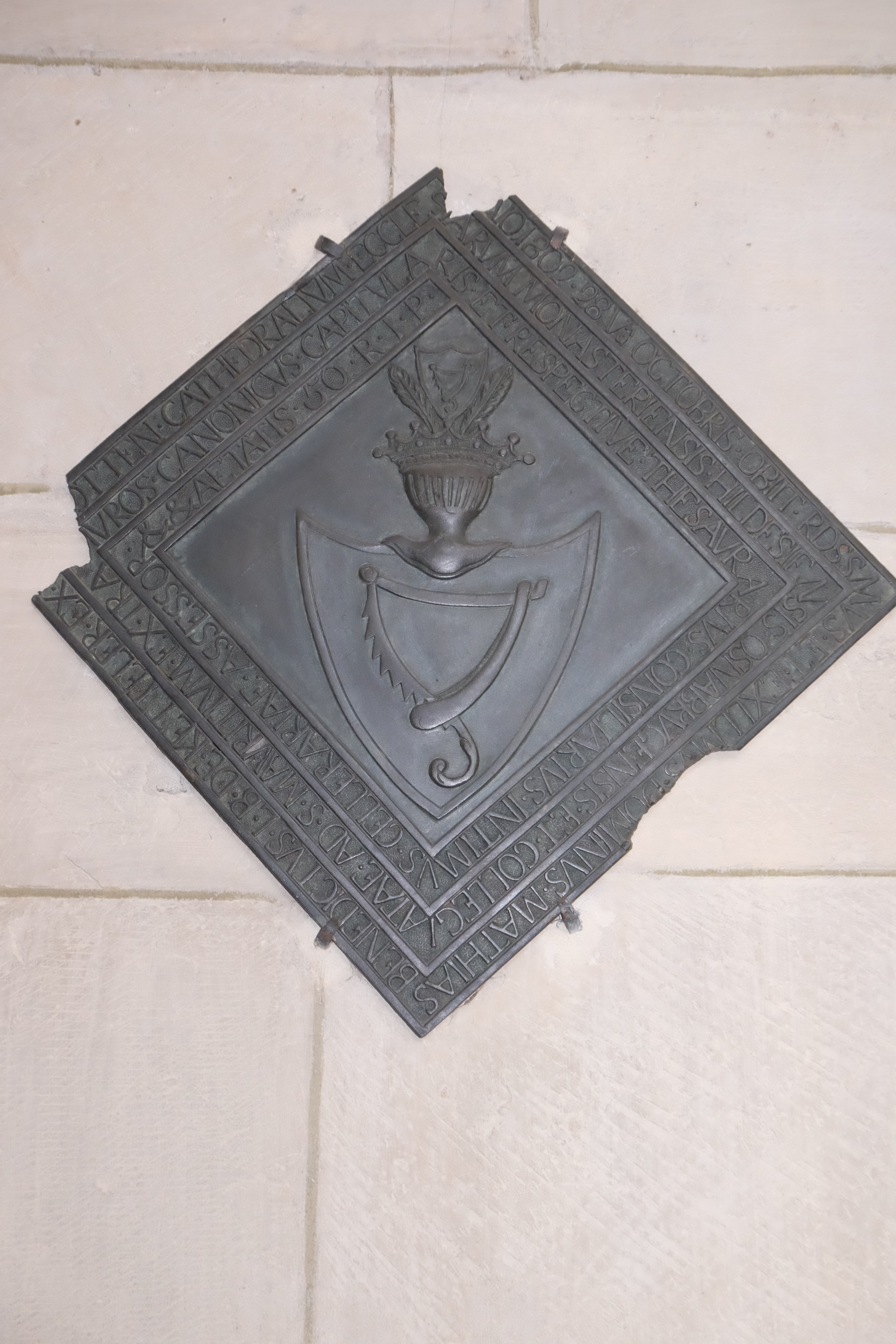 Wappen der Domherrn in Münster; Grabplatte des Domherren Matthias Benedikt von Ketteler zu Harkotten